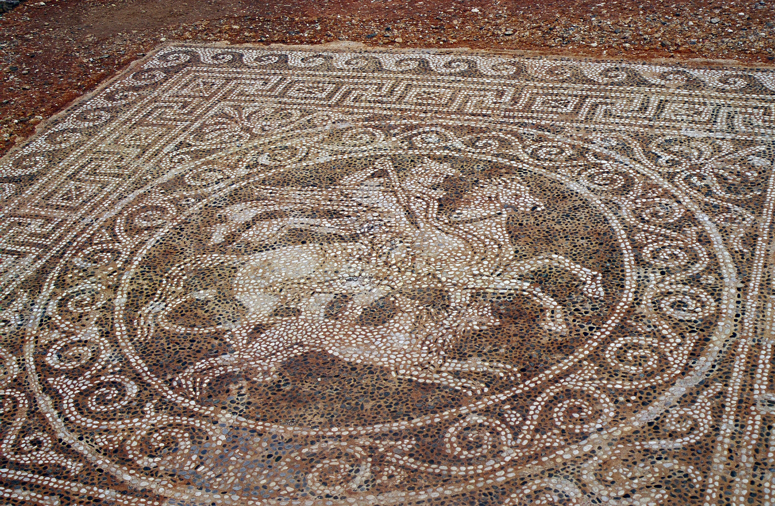 Kieselmosik in einem Haus der Nordstadt Olynths, Darstellung von Bellerophon auf Pegasus im Kampf gegen die Chimäre